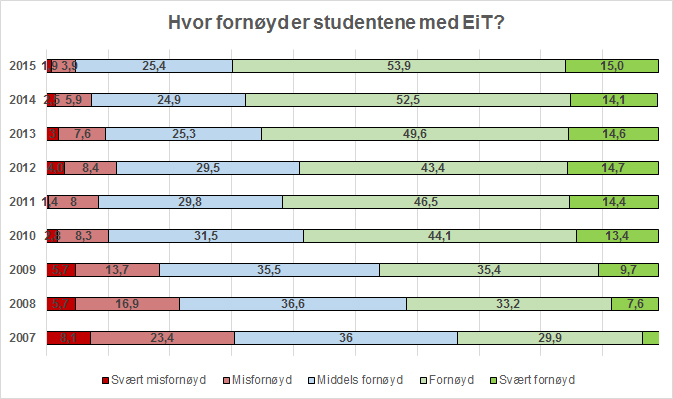 Graf som viser studentenes evaluering av det tverrfaglige emnet "Eksperter i team" ved NTNU, 2007–2015